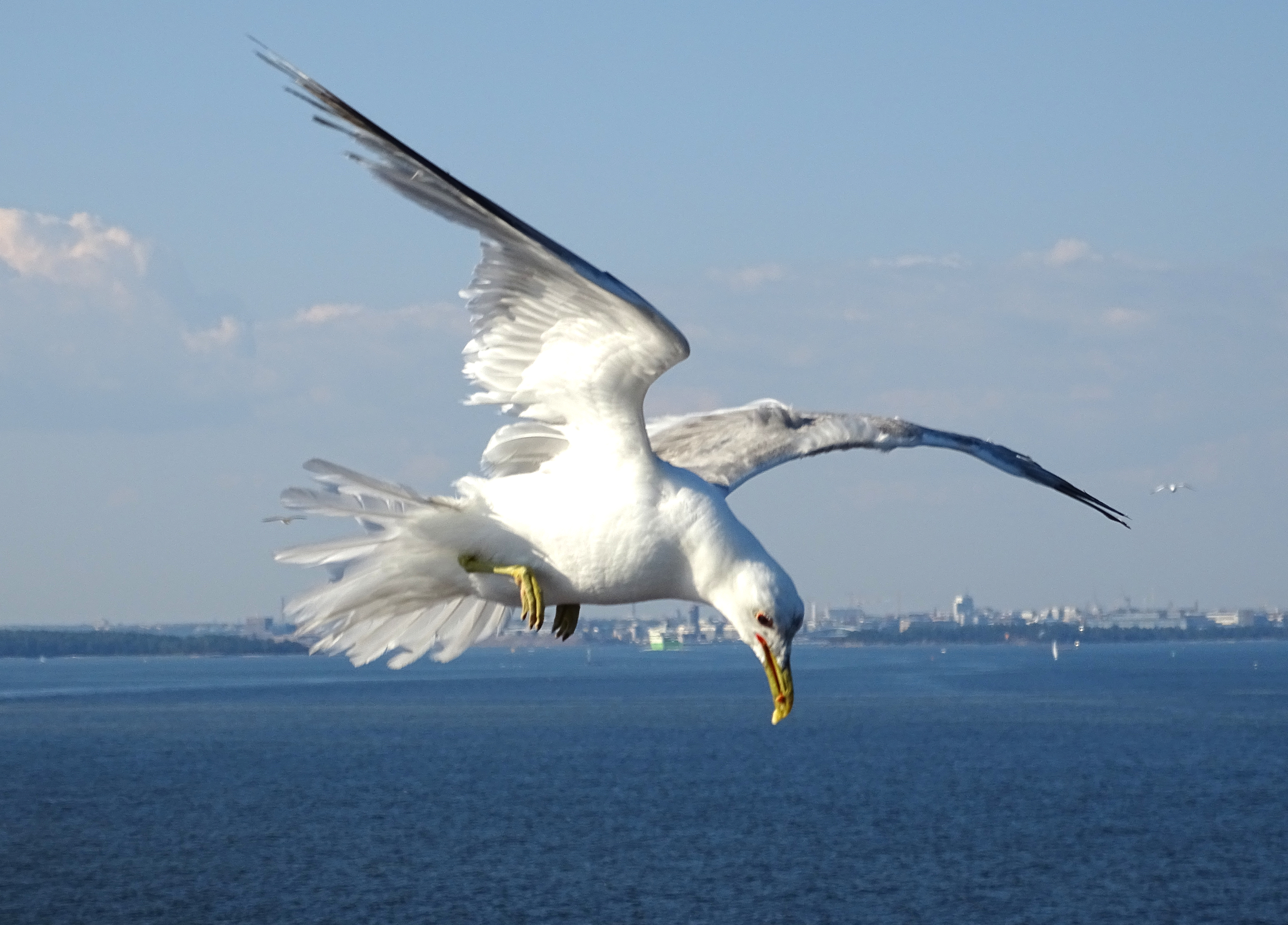 Meeuw in het Balticum